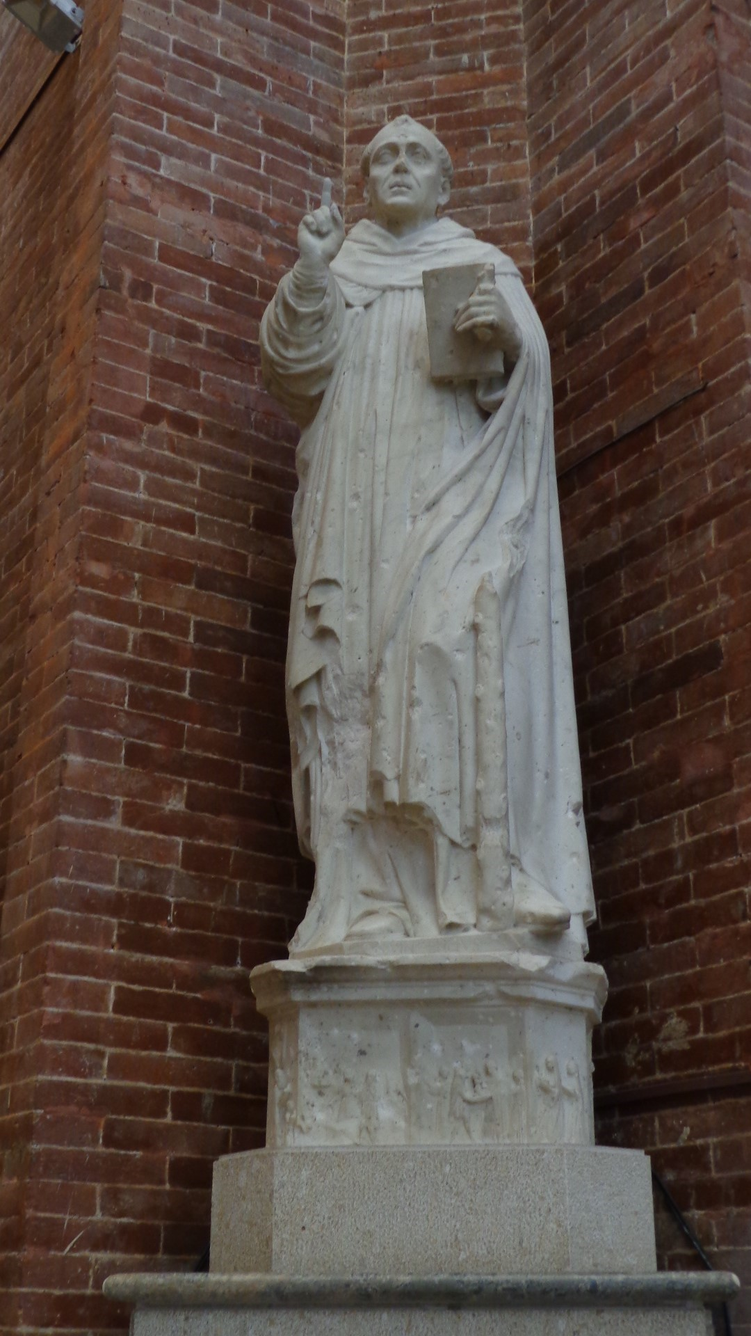 Scultura arco trionfale